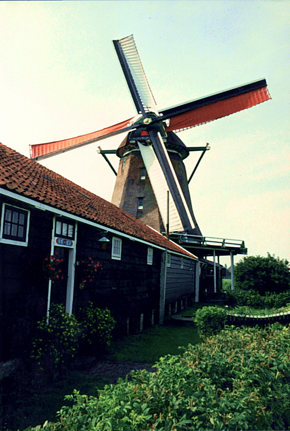 A windmill in Zaanse Schans